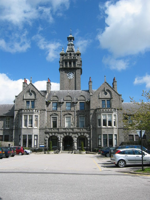 Woodend Hospital, Aberdeen